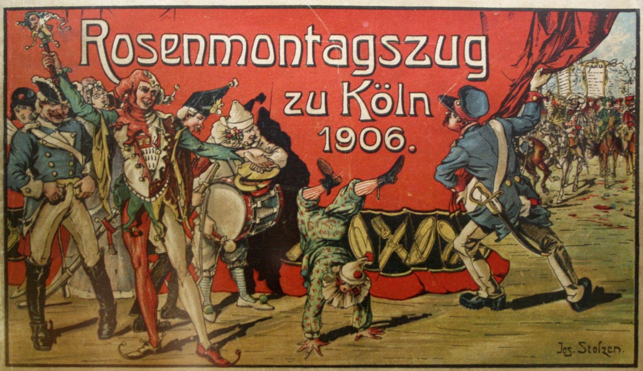 Rosenmontag 1906 - "Prunkmal des Prinzen Karneval"